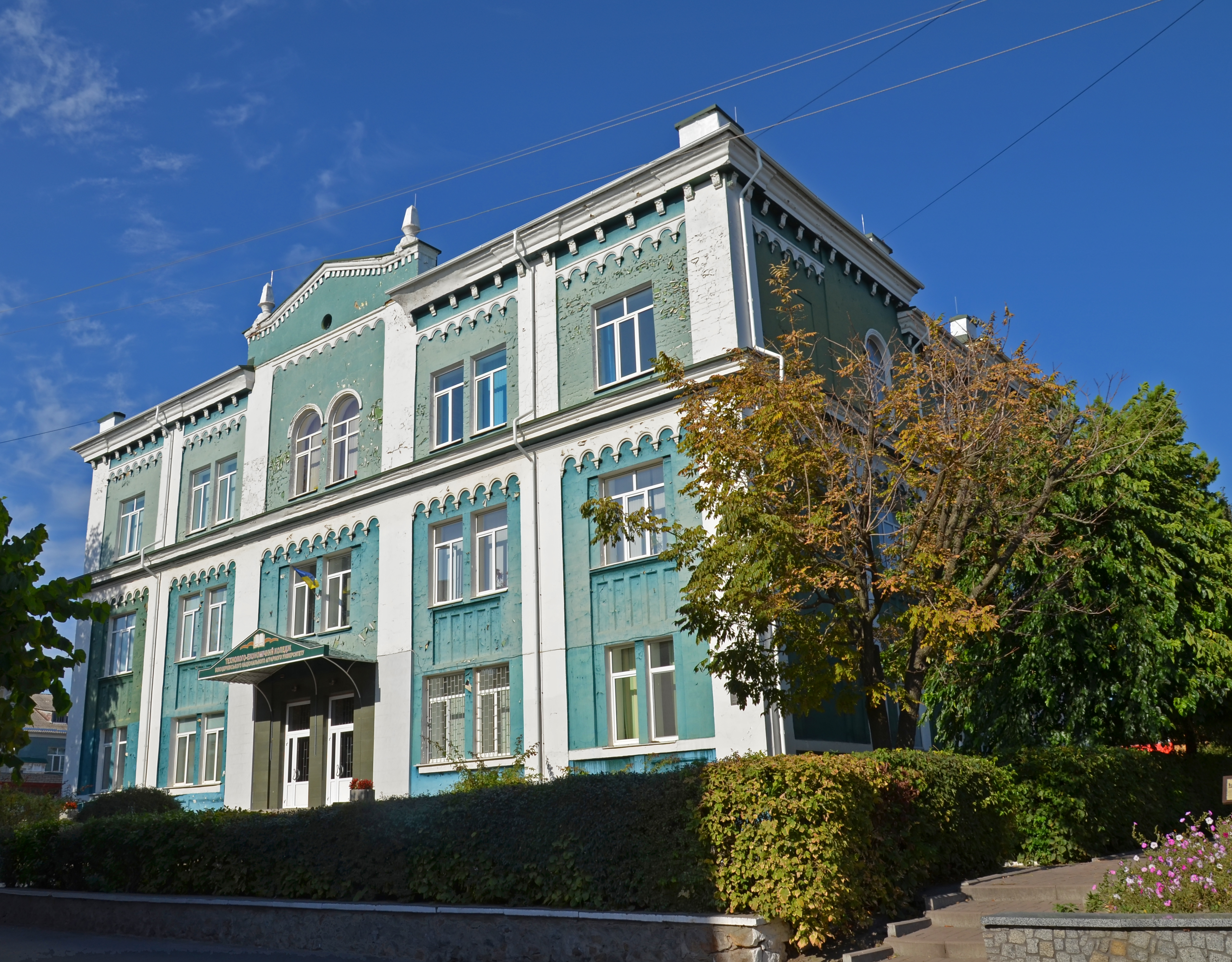 Будівля Великої хоральної синагоги, Біла Церква, вул. Ярослава Мудрого, 21/2 (25/2)